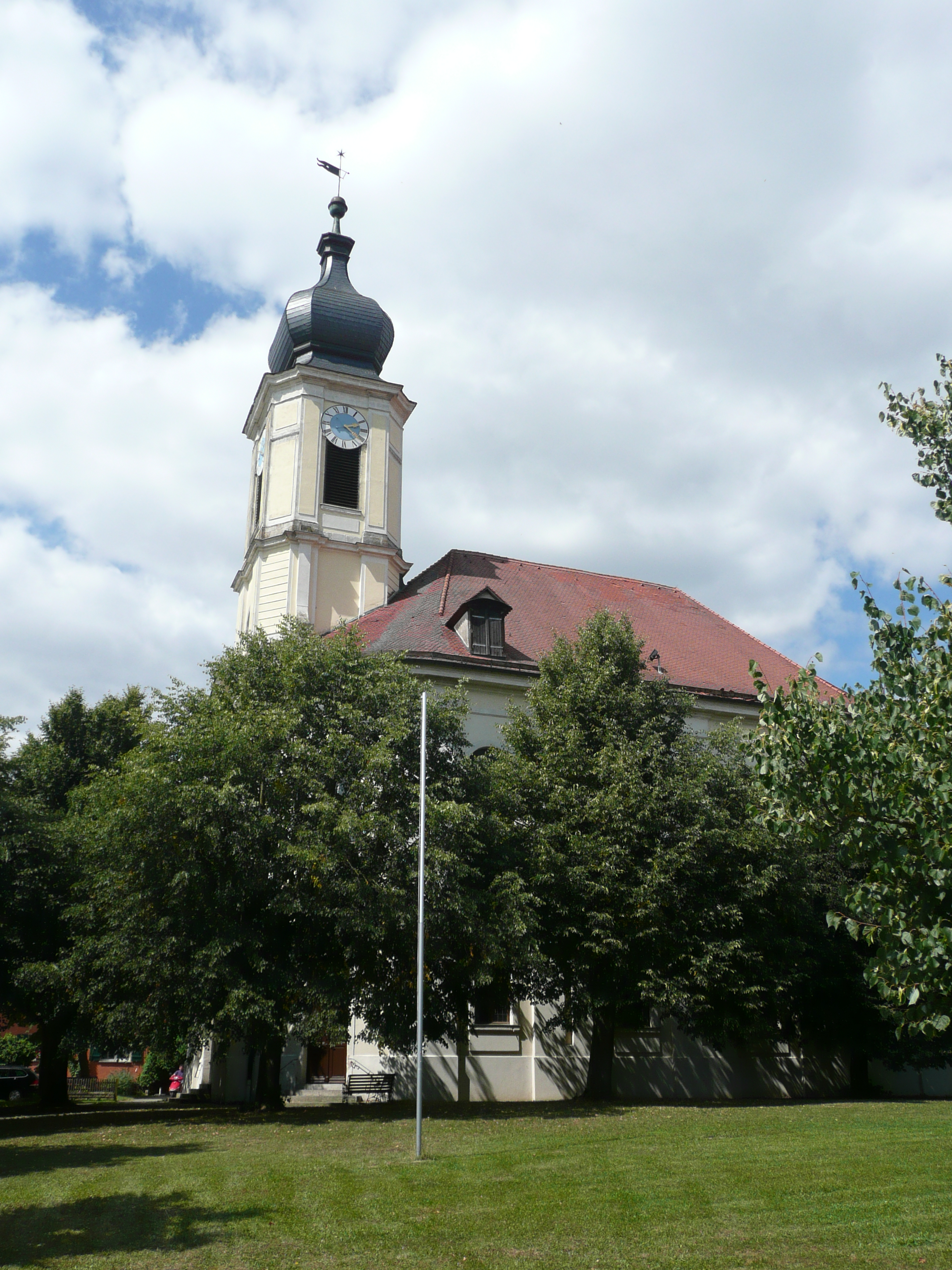 Kirche Unterschwaningen